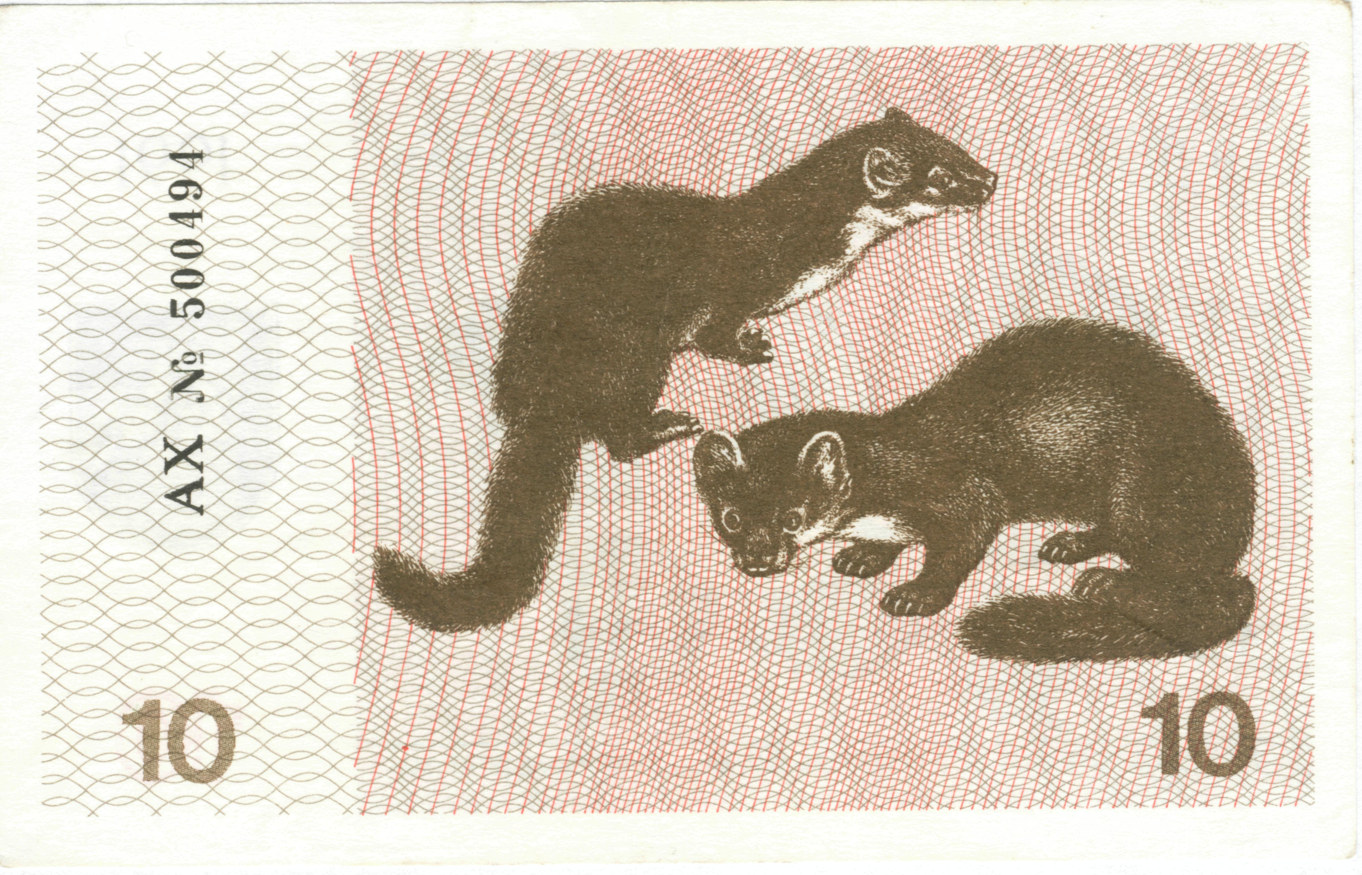 10 talonai reverse "provisional money"